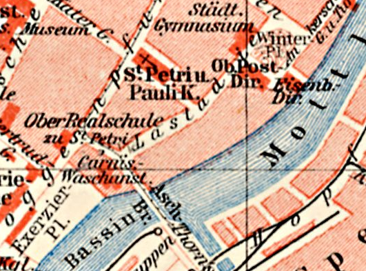 Umgebung der OberRealschule zu St.Petri in Danzig. Ausschnitt aus dem Plan von Danzig in Meyers Konversations-Lexikon, 6. Ausgabe von 1905.